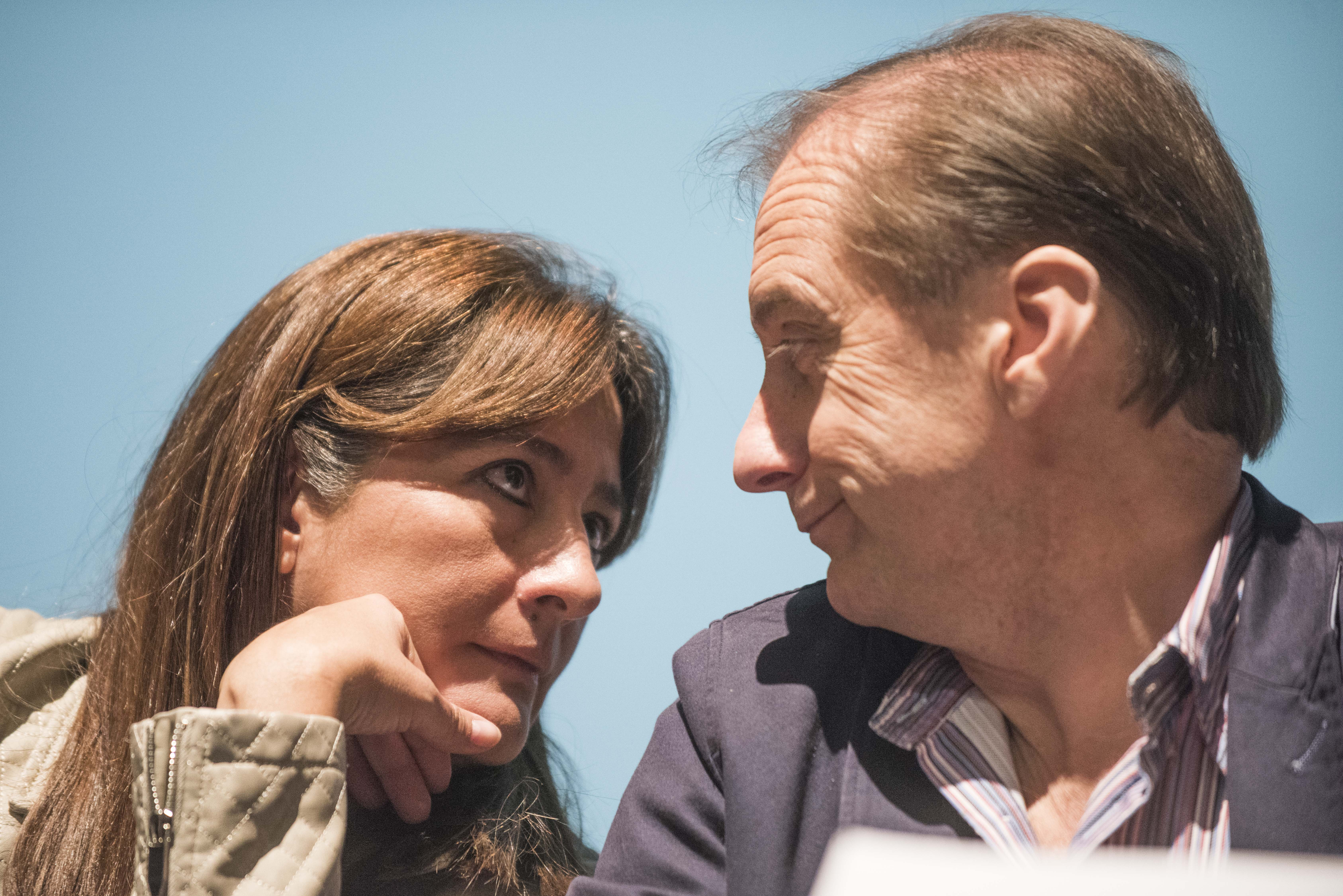 Ángela María Buitrago y Carlos Martín Beristain charlan durante una conferencia de prensa. El Grupo Interdisciplinario de Expertos Independientes (GIEI) es un comité de juristas y médicos enfocados en realizar una investigación paralela sobre los acontecimientos ocurridos la noche del 26 y madrugada del 27 de septiembre de 2014 en la comunidad de Iguala (Guerrero), donde jóvenes estudiantes fueron agredidos y desaparecidos.